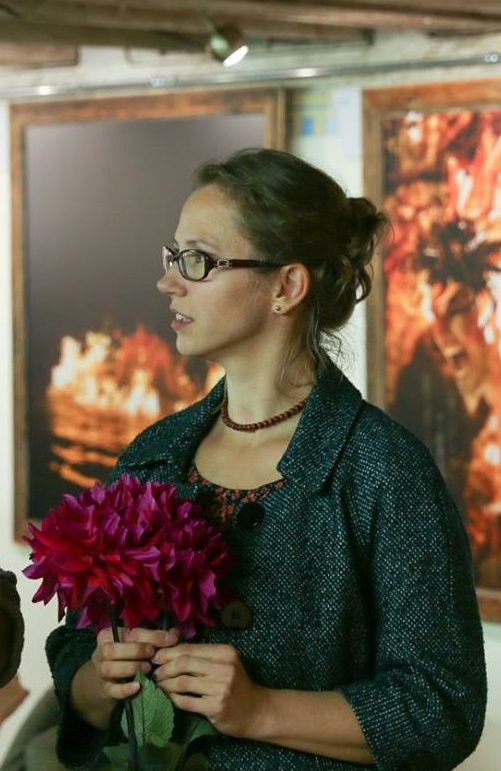 Ürituste sarja "Saksa kultuuri saadikud Eesti Esinduses" avamine, 16.09.2015. Foto: Rainer Leemet